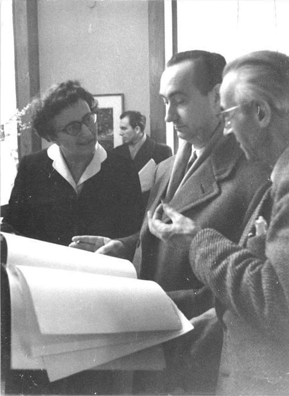 Zentralbild-Blumenthal-Ulmer Vgt-Qu 15.1.1958 22. Kunstausstellung eröffnet. Am 15.1.1958 wurde die 22. Kunstausstellung mit Ölgemälden, Zeichnungen und Aquatinten von Hans Körnig, Dresden, in der Deutschen Bücherstube, Berlin, eröffnet. UBz. Prof. Werner Klemke (mitte) sprach einführende Worte.